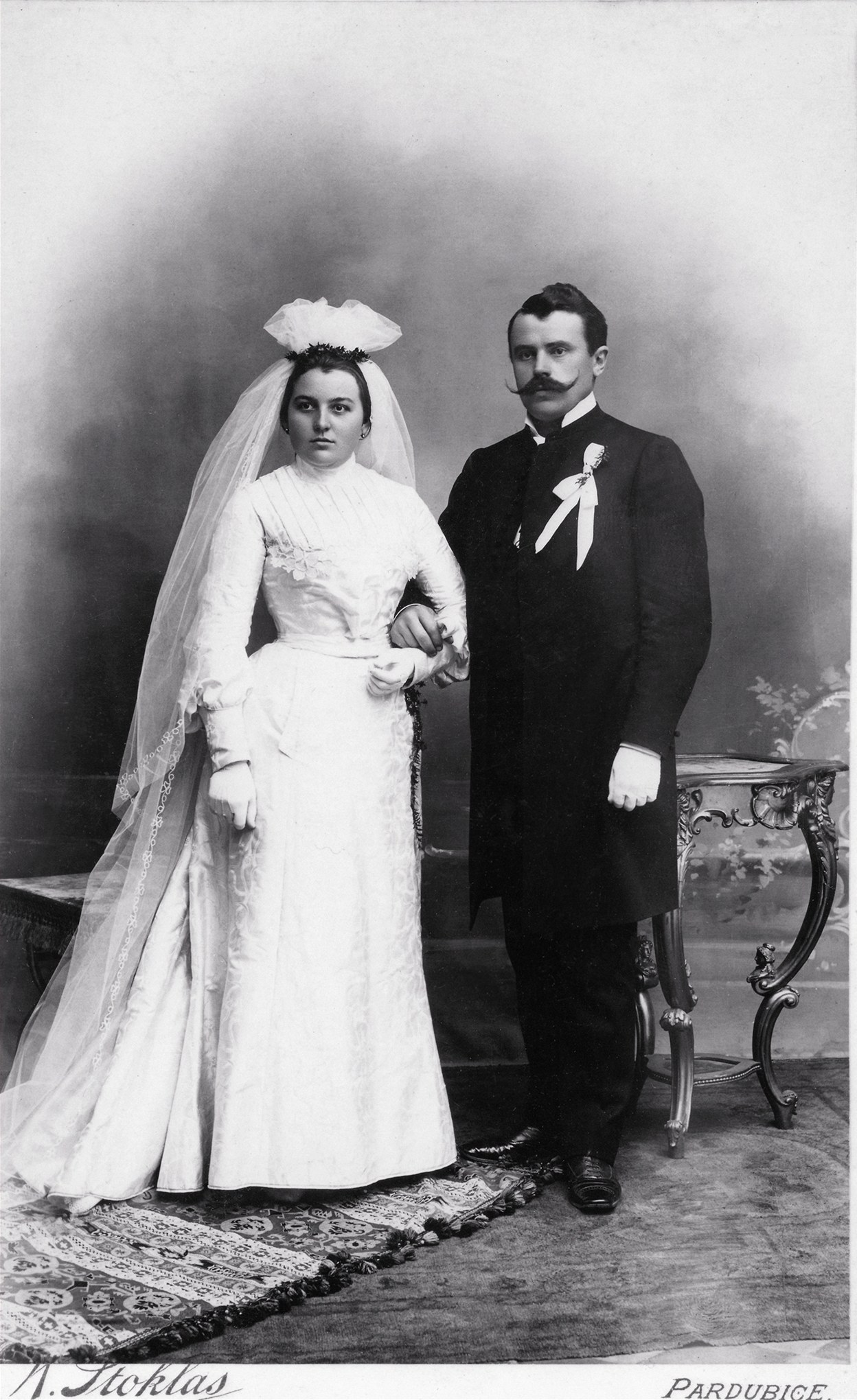 Svatební fotografie Františka (* 1866) a Marie (* 1882) Udržalových